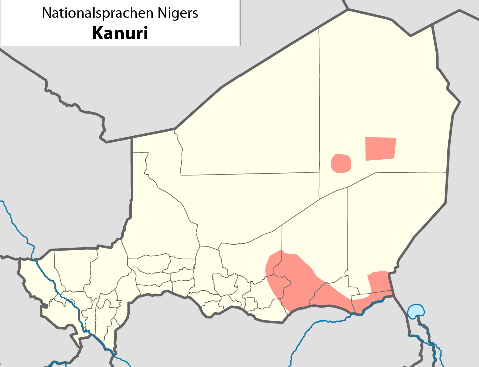 Nationalsprachen des NigerDie dargestellte Nationalsprache kann dem Dateinamen entnommen werden.